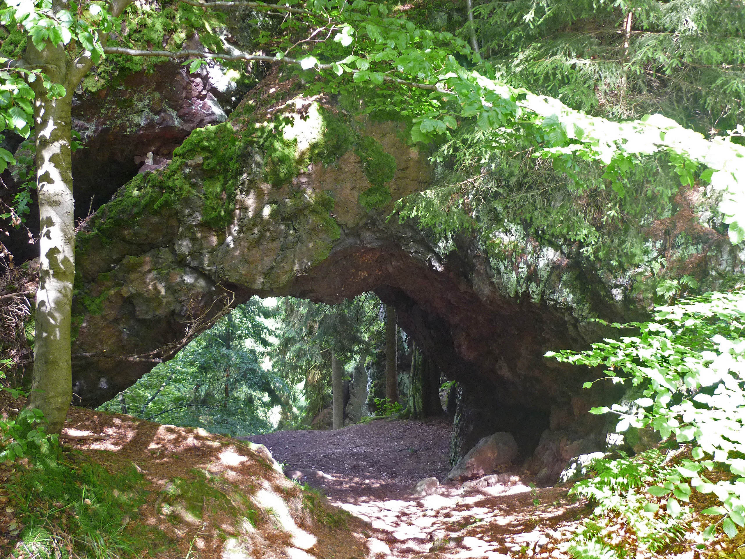 Der Torstein oberhalb des Lauchagrunds bei Tabarz